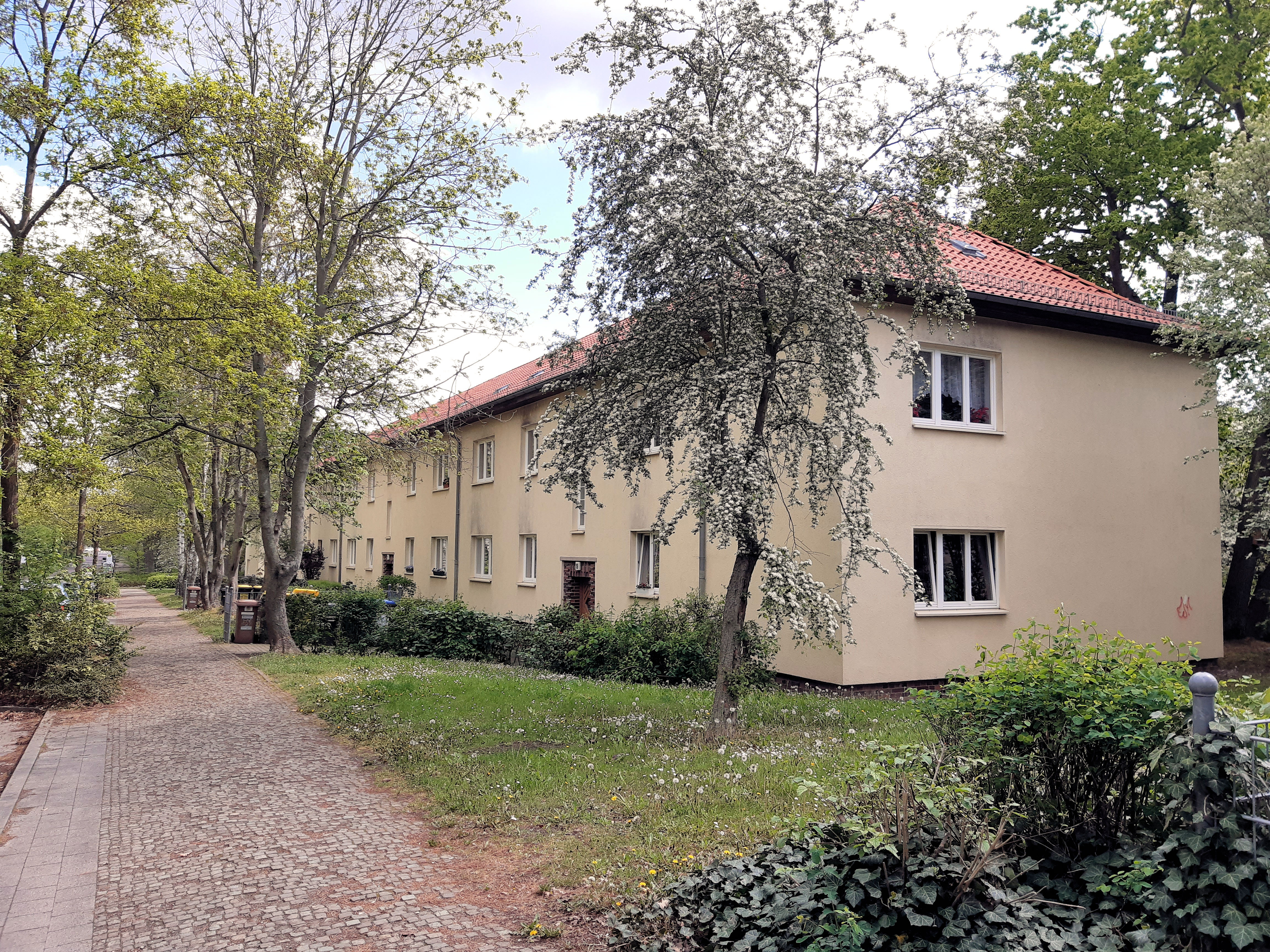 Siedlung Am Heiderand, ehem. Offizierssiedlung, erbaut 1935-1937, Architekt Wilhelm Ulrich, Stadtteil Heide-Süd, Halle (Saale)